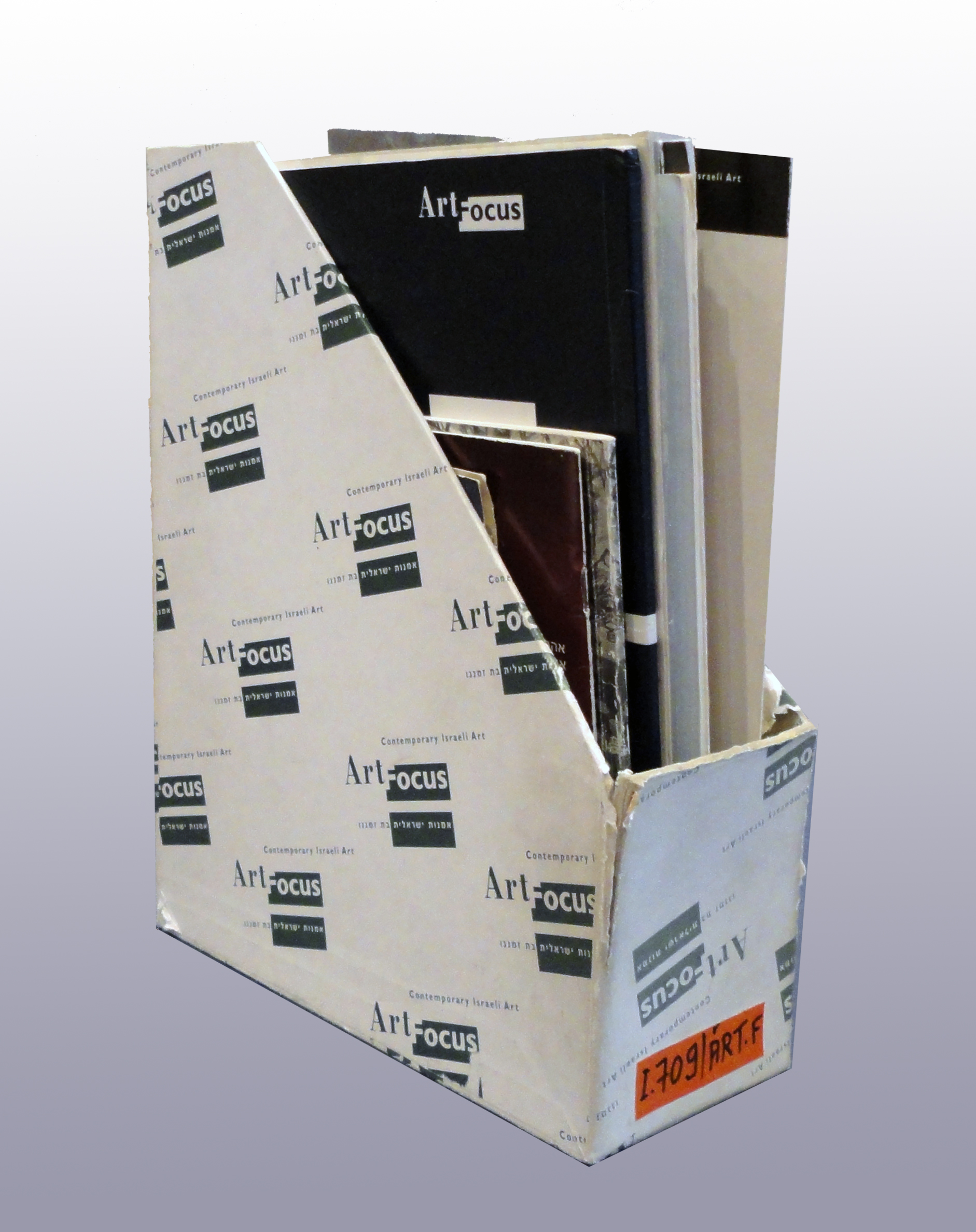 אוגדן של קטלוגים מתערוכות ארטפוקוס 1 (1994)